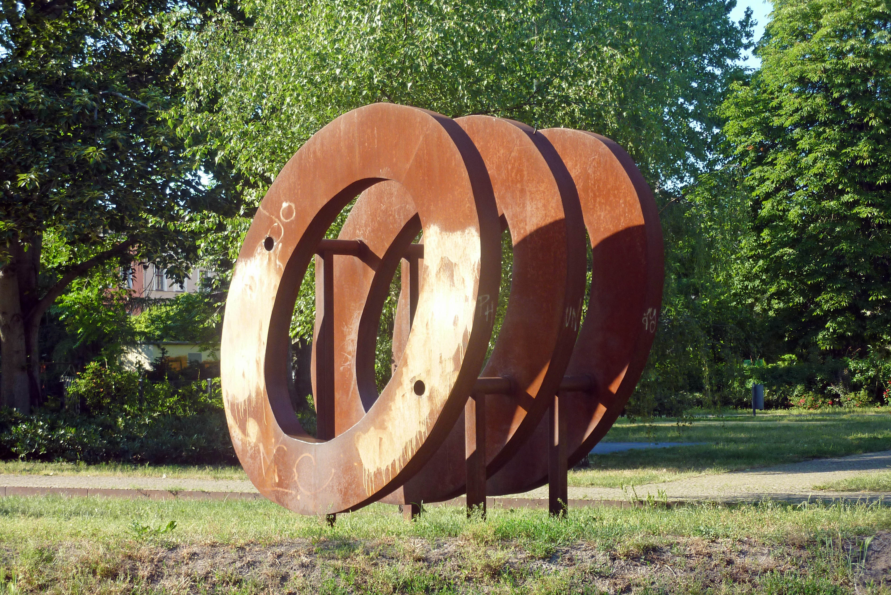 Stahlplastik 'Ringstadien' von Jenny Brockmann für die Victoriastadt in Berlin-Rummelsburg. Aufgestellt im Jahr 2002 auf der Grünanlage an der Ecke Türrschmidtstraße/Pfarrstraße.